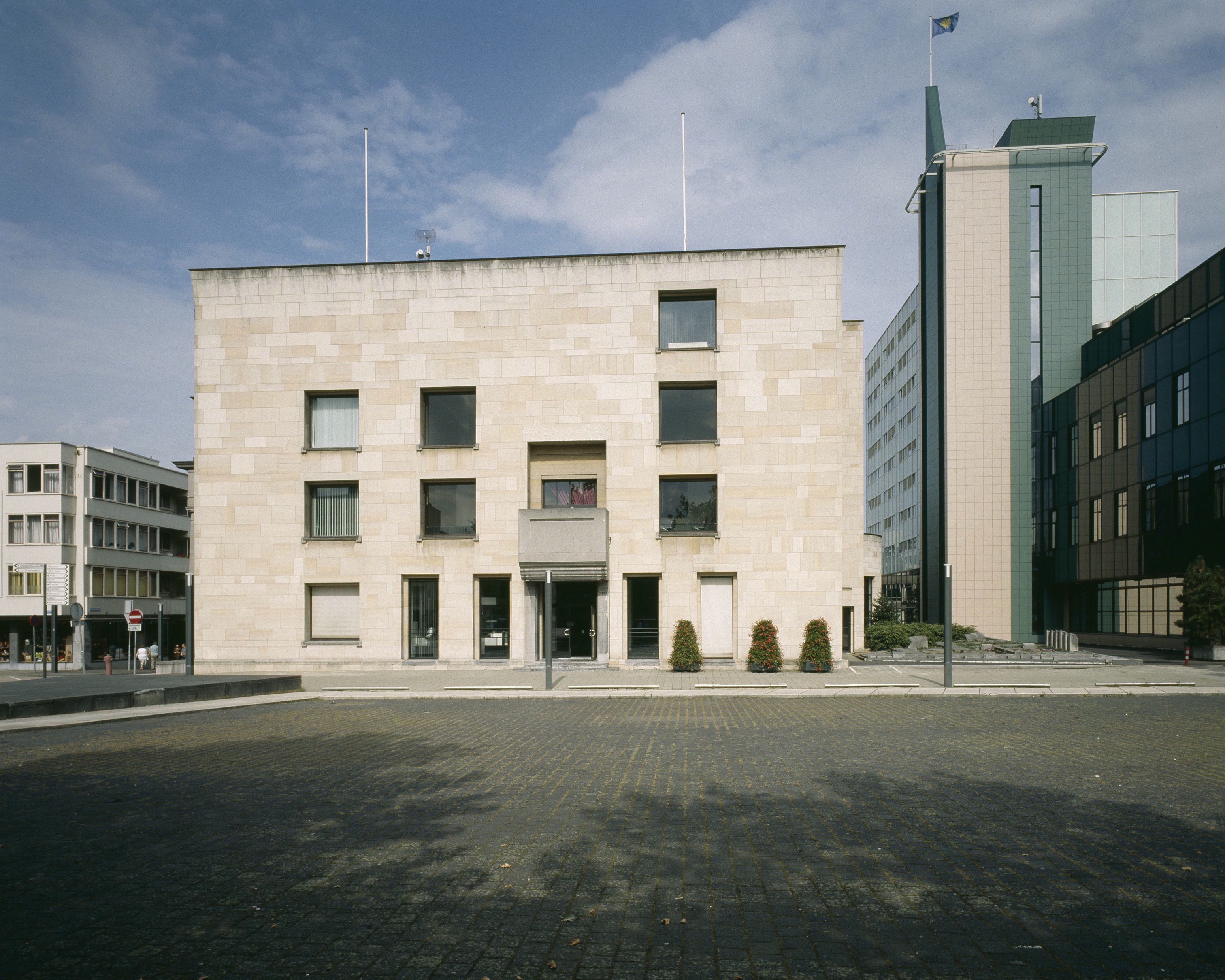 Raadhuis van Heerlen (Frits Peutz, 1936-42). Overzicht voorgevel (zijde Raadhuisplein)